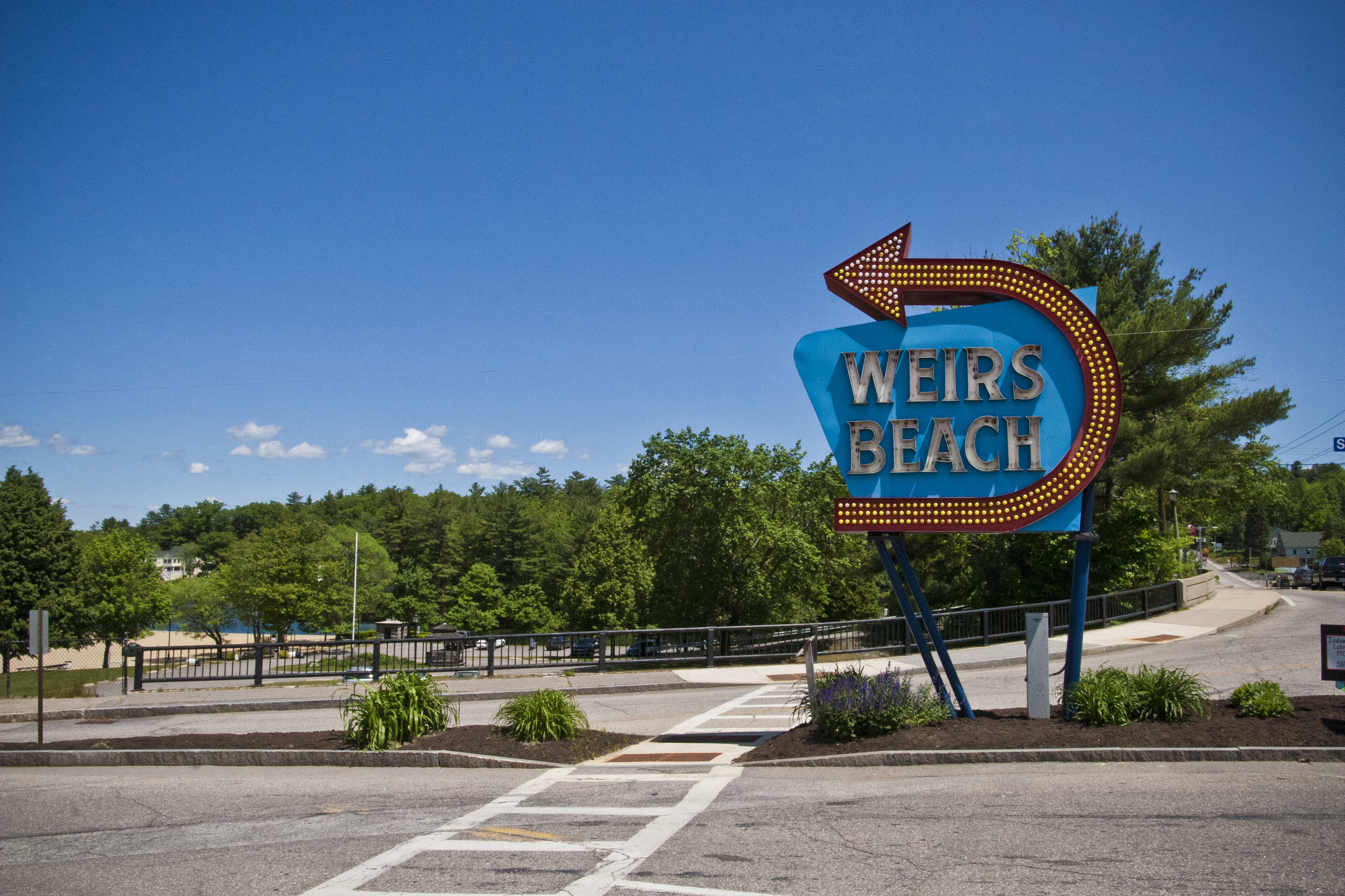 Weirs Beach sign.